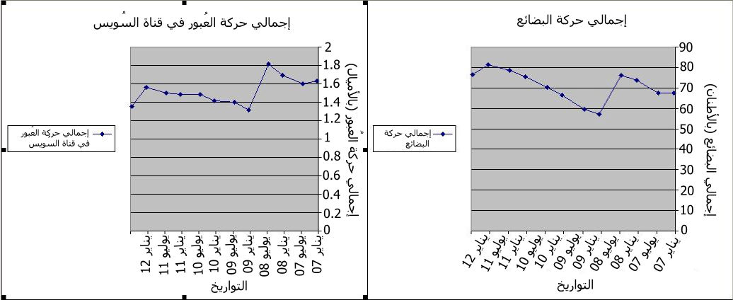 رسمٌ بيانيّ يُبيِّنُ كميَّة البضائع التي عبرت قناة السُويس مُنذ سنة 2007م حتَّى سنة 2012م.